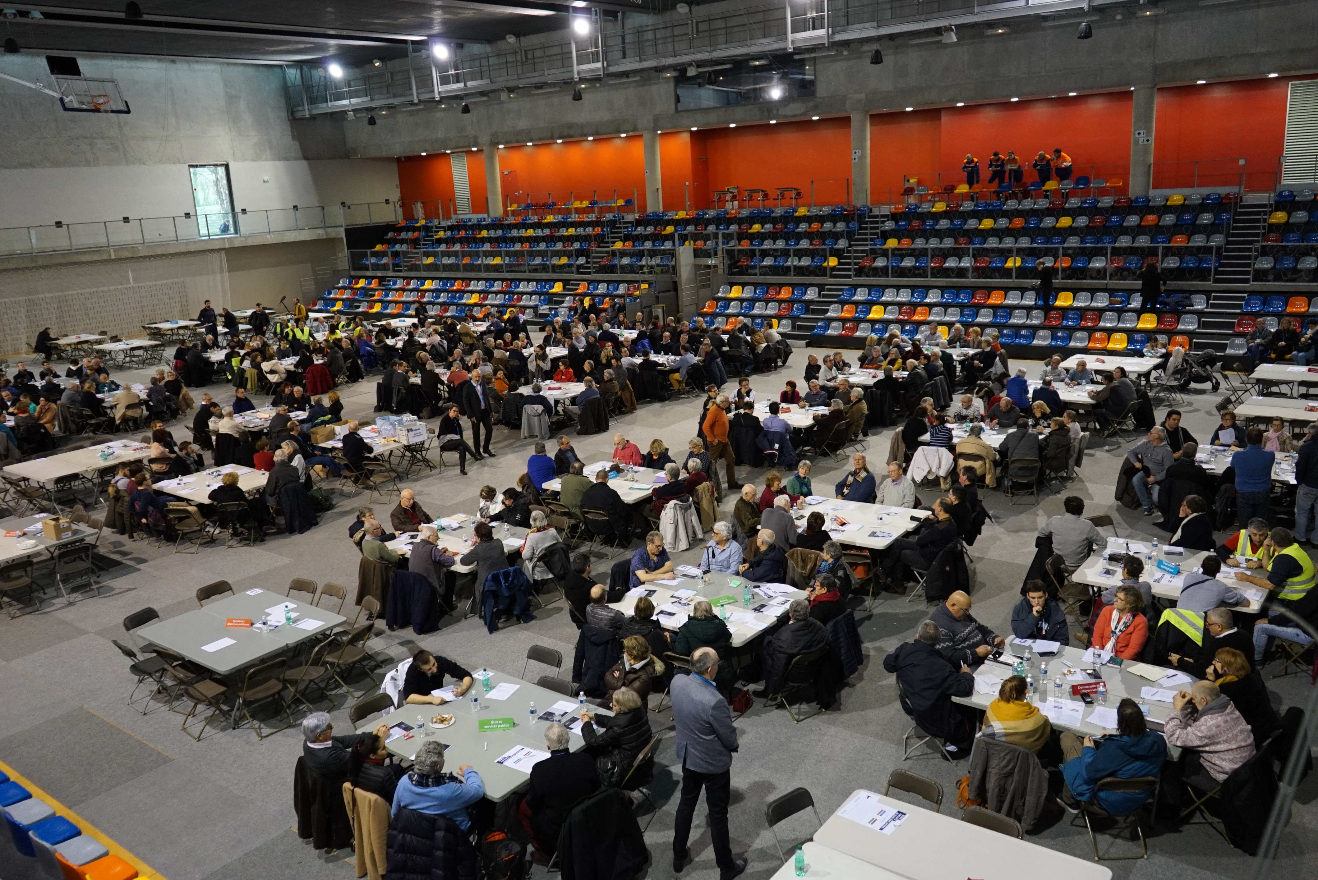 lors du Grand débat national organisé à Reims.